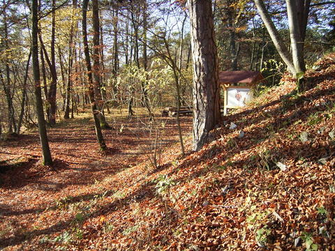 Burghof der Benzenburg